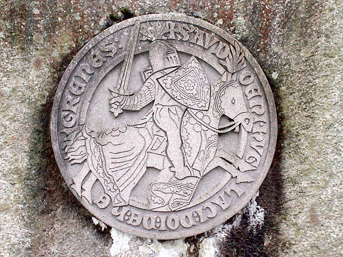 Audun Hugleikssons skjold, moderne utforming